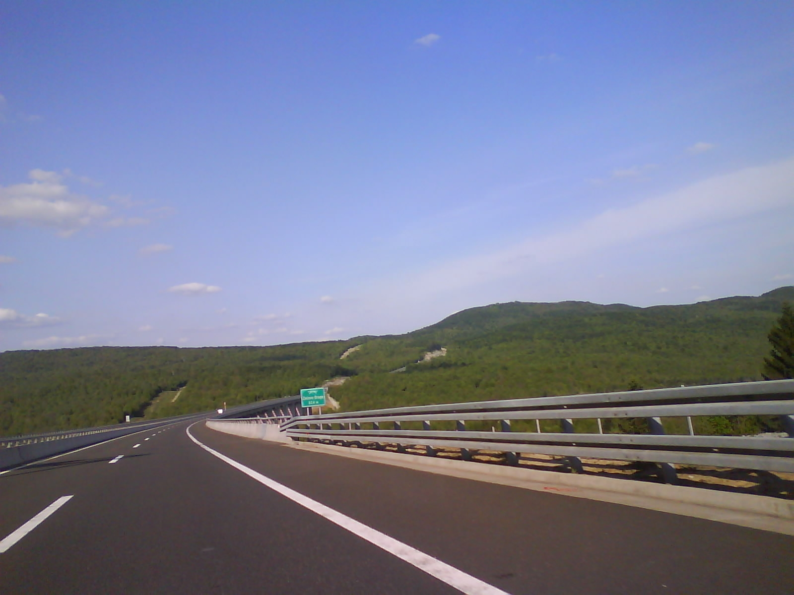 Vijadukt Zečeve Drage